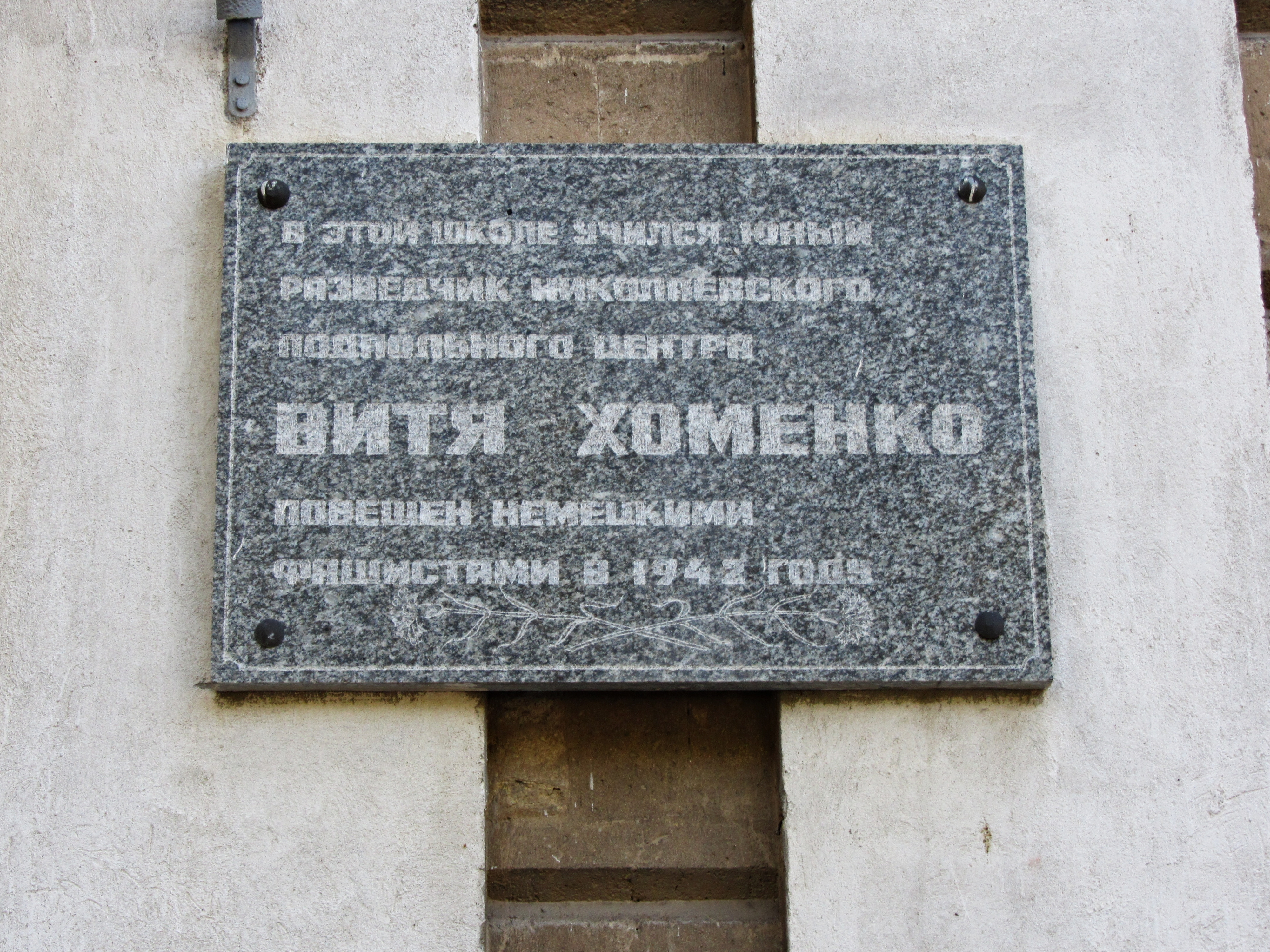 Миколаїв вул.Нікольська,34 (Сиваський сквер) Маріїнська гімназія 1982 р. Будинок, в якому, була школа де навчався В.Хоменко, юний розвідник, учасник підпільної організації “Миколаївський центр” 1941 –1942 рр.